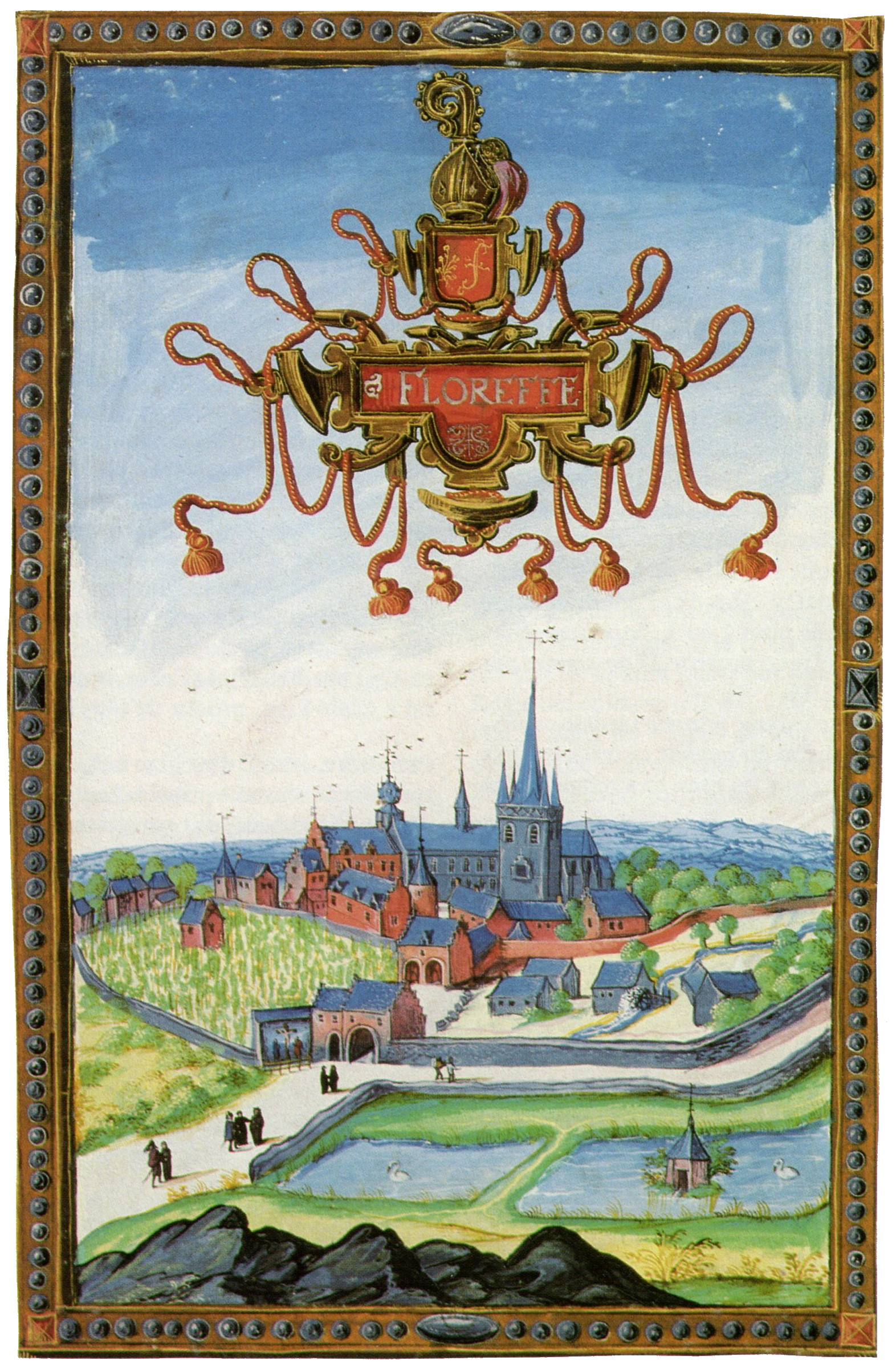 Abbaye de Floreffe en 1604. Albums de Croÿ, Paris, Bibliothèque nationale.